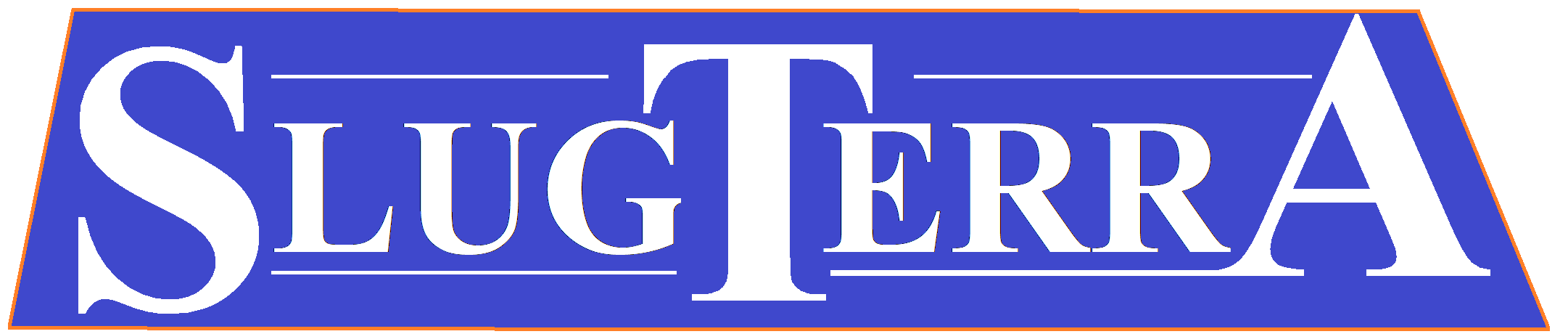 Logotipo de Slugterra